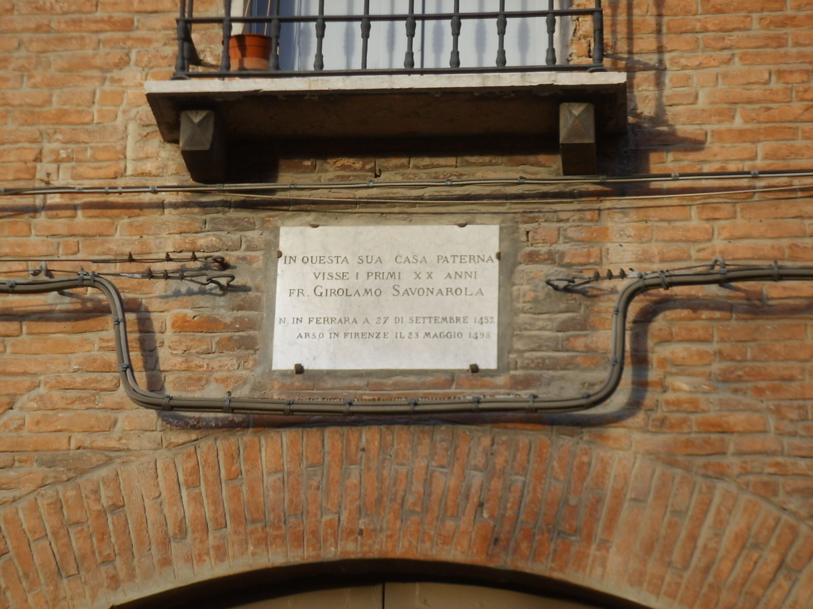 Ferrara, lapide sulla facciata della casa natale di Girolamo Savonarola.